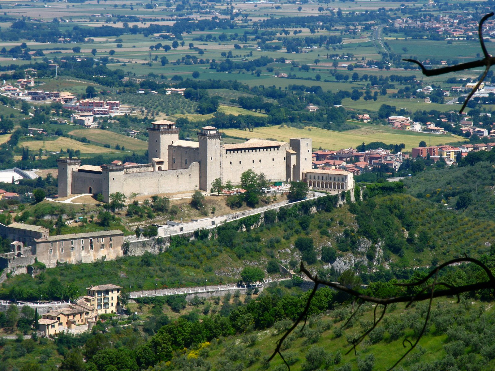 Spoleto, Umbria, ItaliaRocca Albornoziana Spoleto